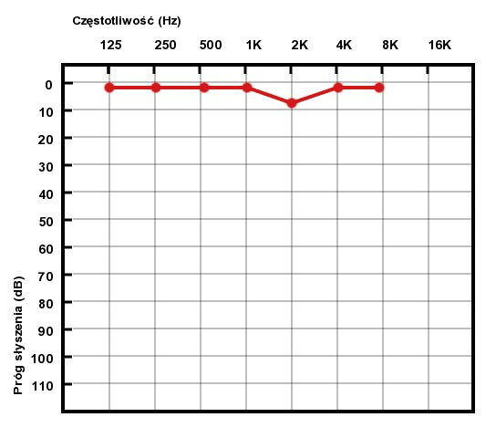 Audiogram przedstawiający prawidłowy słuch